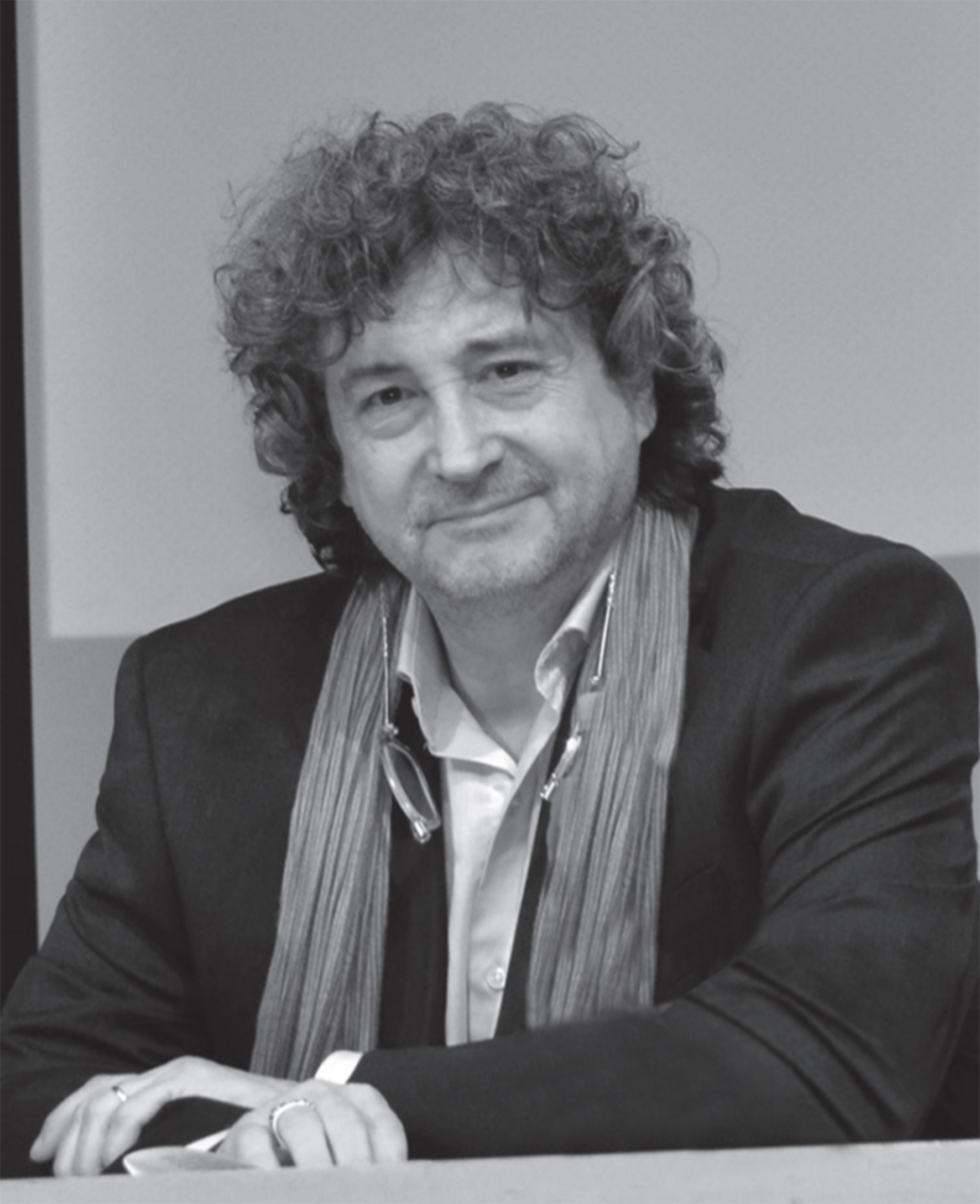 Miguel Angel Diani en 2017, durante la asuncion de su segundo mandato en la presidencia de Argentores